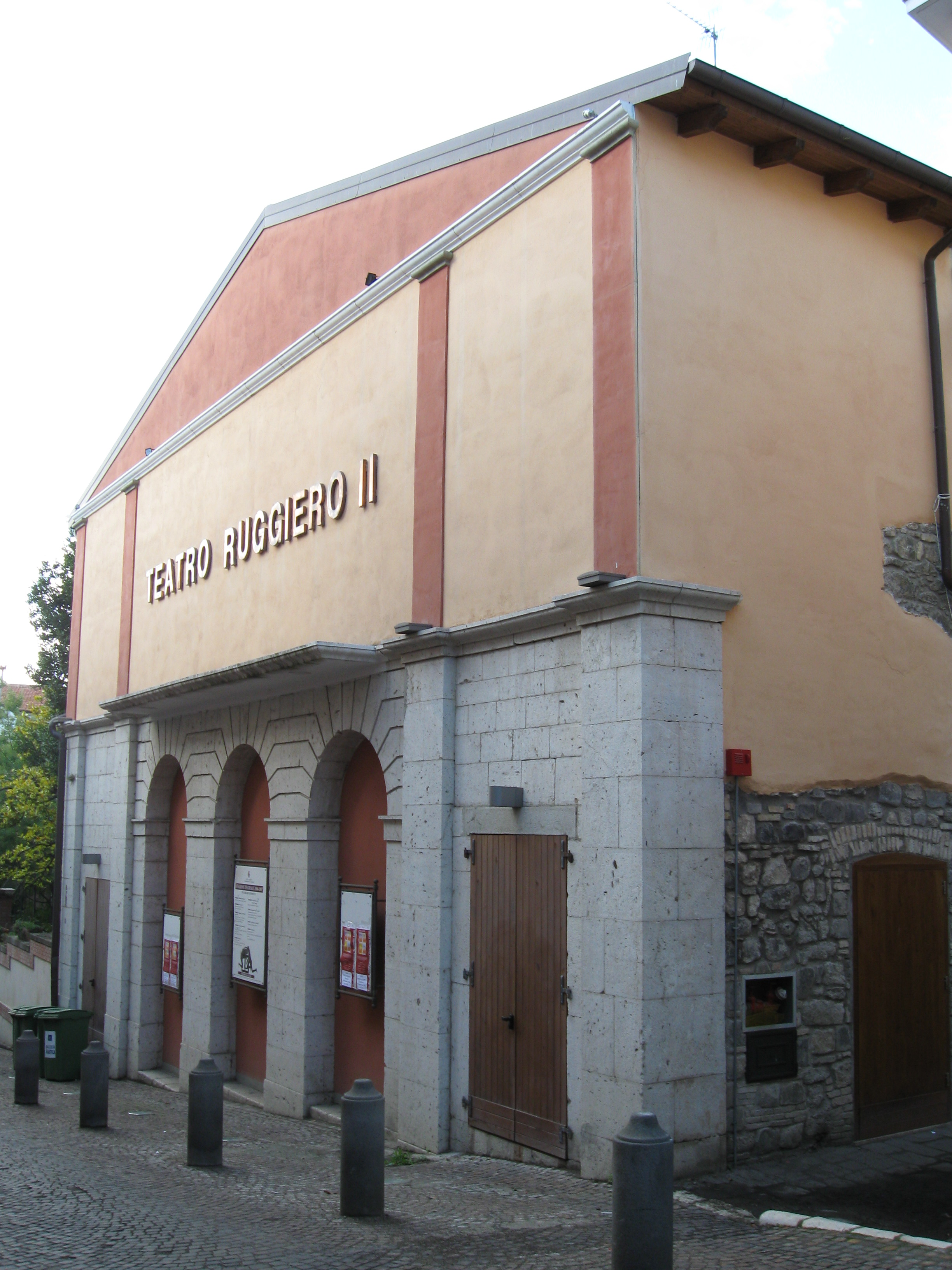 Teatro Ruggero II di Melfi, Basilicata